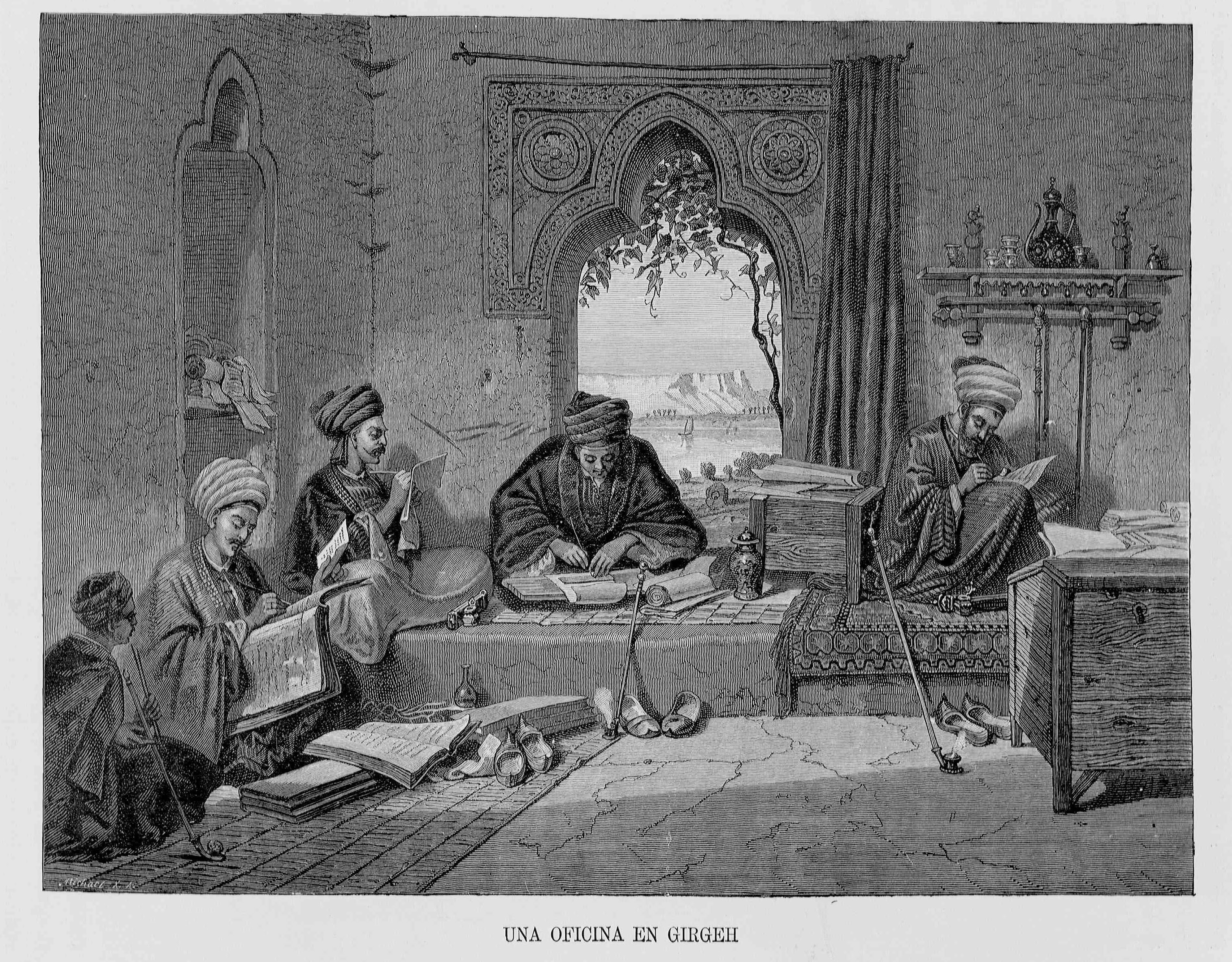 Autor: Ebers, Georg Moritz, 1837-1898 Descripción bibliográfica: Egipto / por Jorge Ebers ; traducción directa del alemán por Antonio Bergnes de las Casas, revisada y corregida por Cayetano Vidal de Valenciano. - Ed. monumental ilustrada con 650 grabados ... del reputado pintor Cárlos Werner. - Barcelona : Espasa y Compañía, 1882?. - 2 v. (X, 408, [1] p., [14] h. de lám. ; 438, [1] p., [14] h. de lám.). : il. ; 40 cm Materia: Egipto - Historia Materia: Egipto - Descripciones y viajes - Siglo 19 Notas: Palau, t. 5, p. 1, lo fecha de manera aproximada en 1882. - Port. a dos tintas. - Antep. - Ilustrada con 650 grabados intercalados en el texto y enriquecida con dos cartas geográficas tirada a tres tintas, una portada en colores y 24 magnificas imitaciones de las artísticas acuarelas del pintor Carlos Weiner Traductor:Bergnes de las Casas, Antonio, 1801-1879 Ilustrador:Werner, Karl, 1821-1888, il. Localización: Libro completo